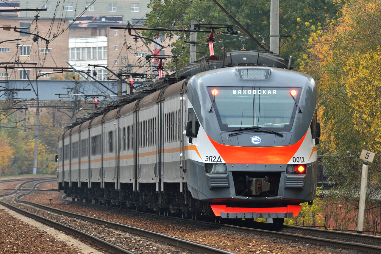 Электропоезд ЭП2Д-0012 построен ОАО «ДМЗ» в 11-вагонной составности С завода имел серо-белую окраску с жёлтой полосой («Hаше Подмосковье») Вагоны имеют прислонно-сдвижные герметизированные двери с выходом на высокие платформы С завода поступил в собственность ОАО «Центральная ППК» 22.03.2017 — прибыл на техническое обслуживание в ТЧ-17 Нахабино Мск __.0_.2017 — введён в эксплуатацию